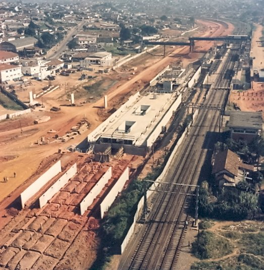 Vista das obras da estação Patriarca, da Linha 3-Vermelha do Metrô. Suas obras foram iniciadas em 1 de setembro de 1984 e concluídas em 17 de setembro de 1988.